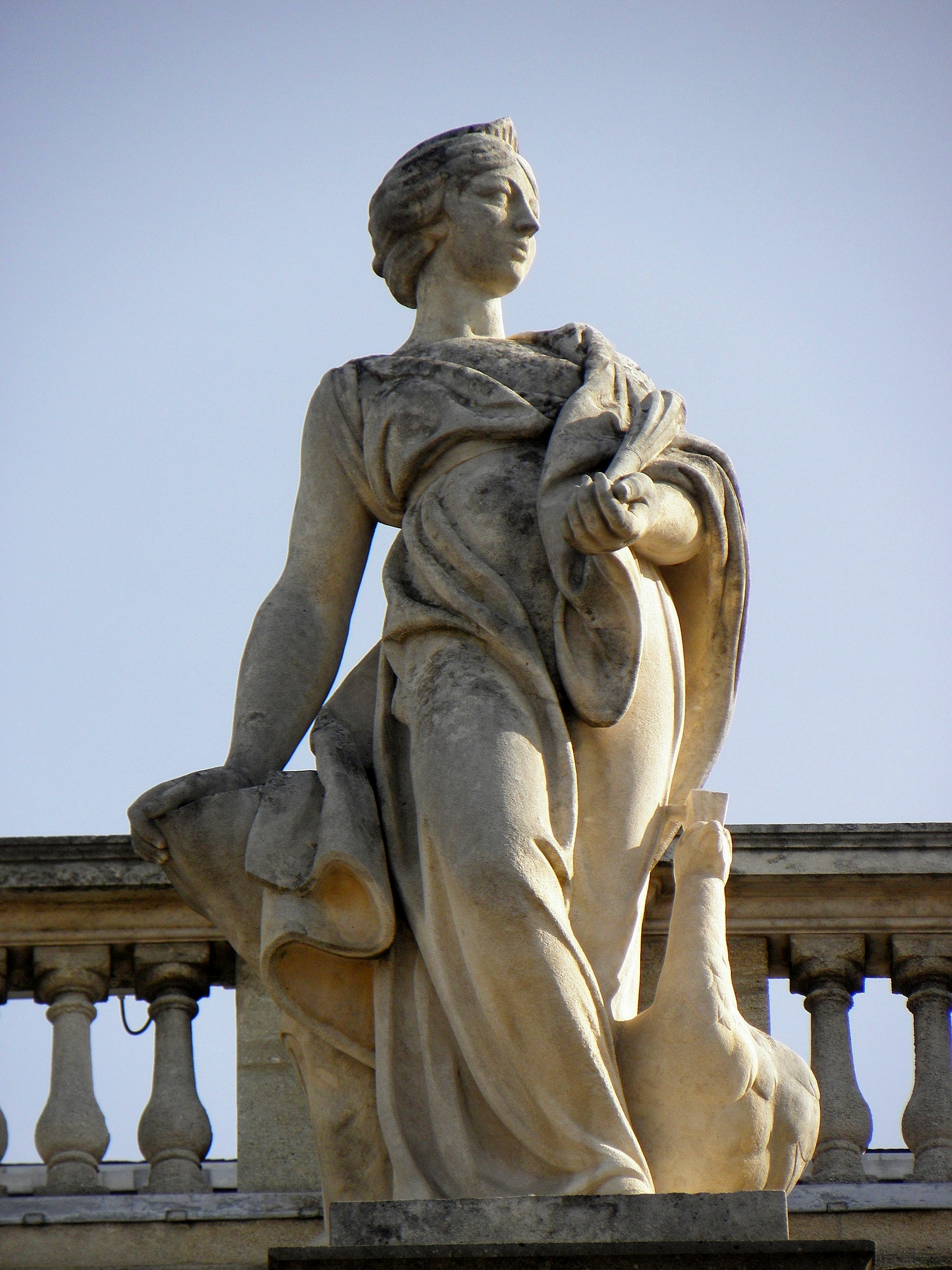 Grand-Théâtre de Bordeaux (33). Portique. Statue de Junon, déesse de la fécondité.